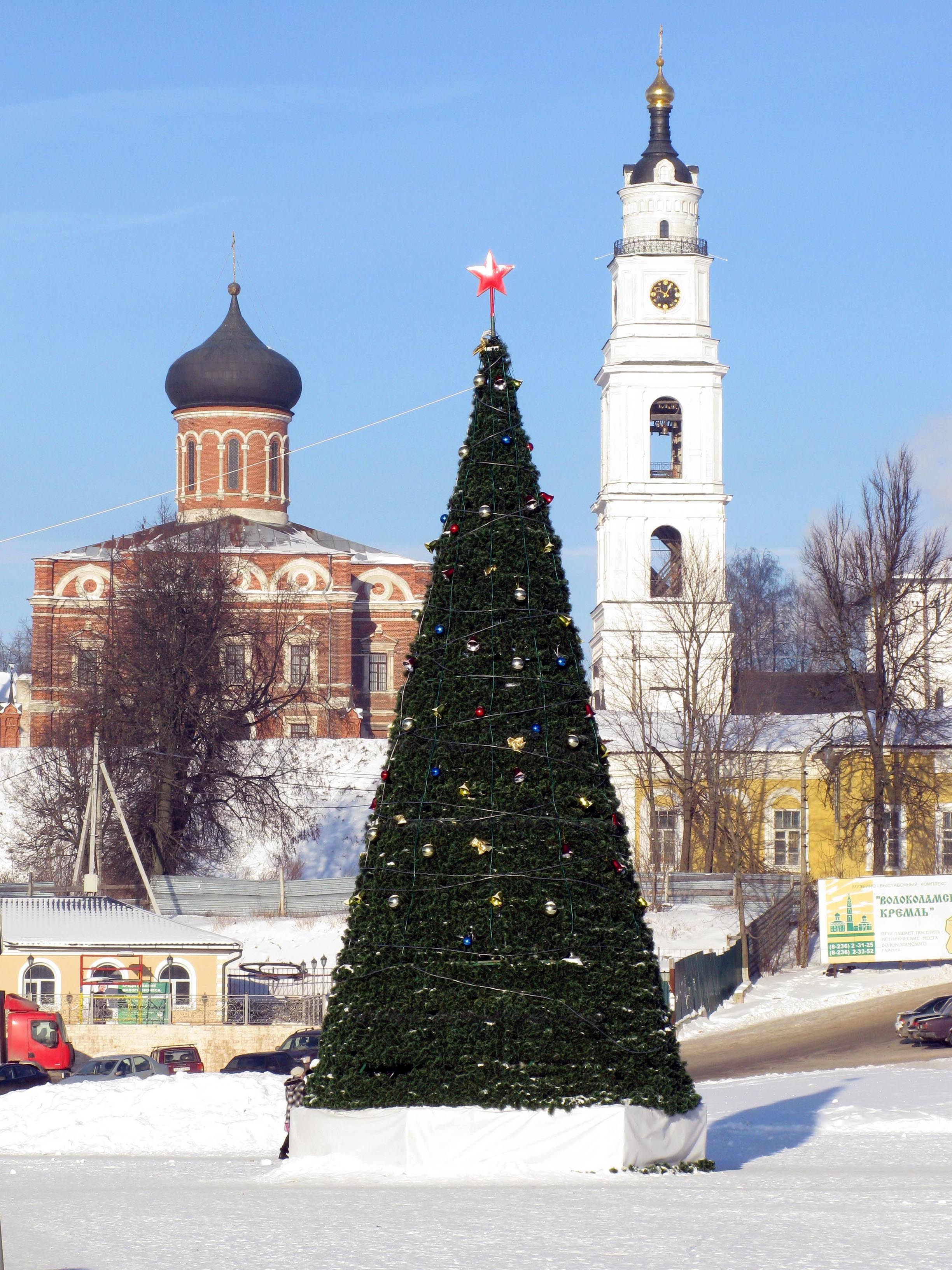 Волоколамск